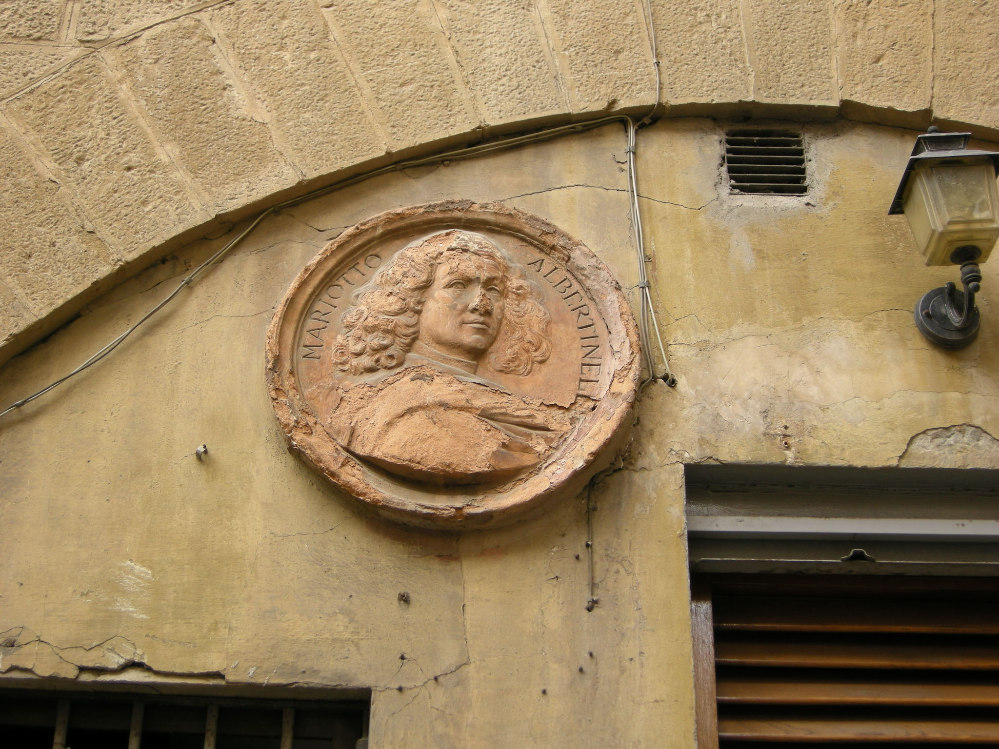 Da pennello, targa mariotto albertinelli